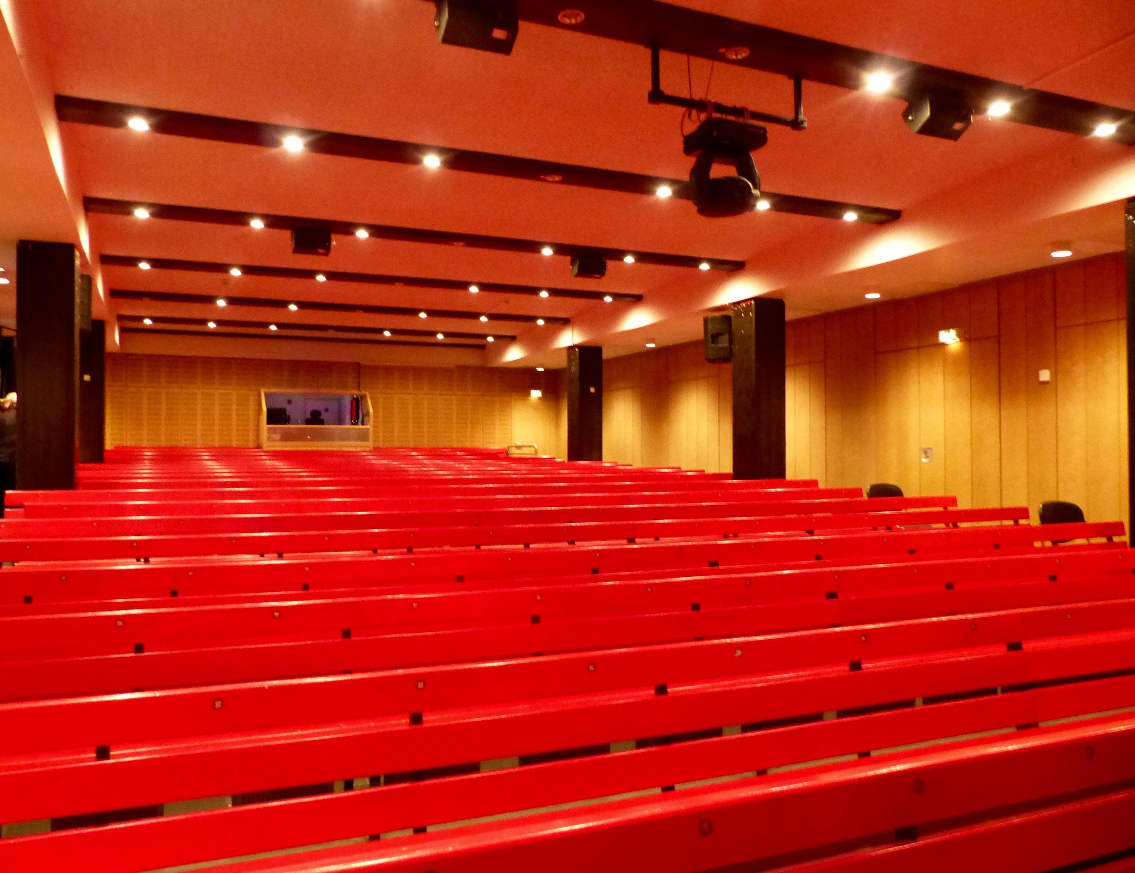 Hinger de Britz während der Hänneschen-Kirmes 2016: Theater-Raum